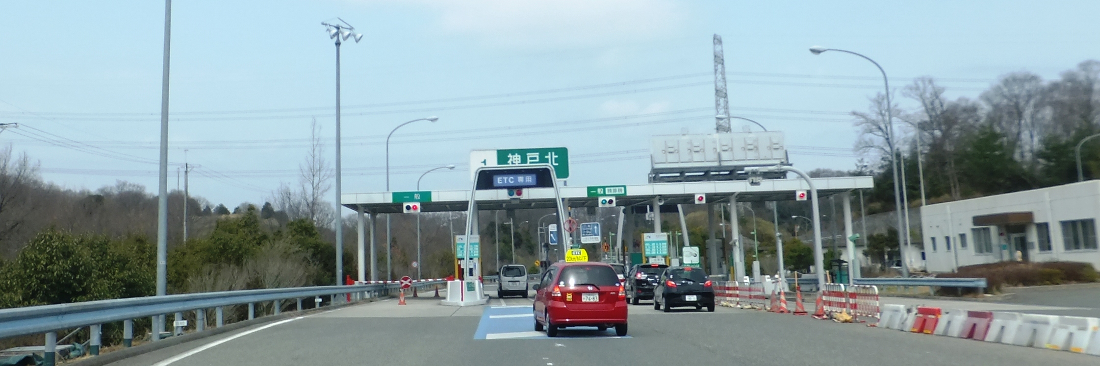 神戸北インターチェンジ